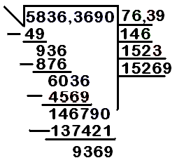 Resultado de la raiz cuadrada.